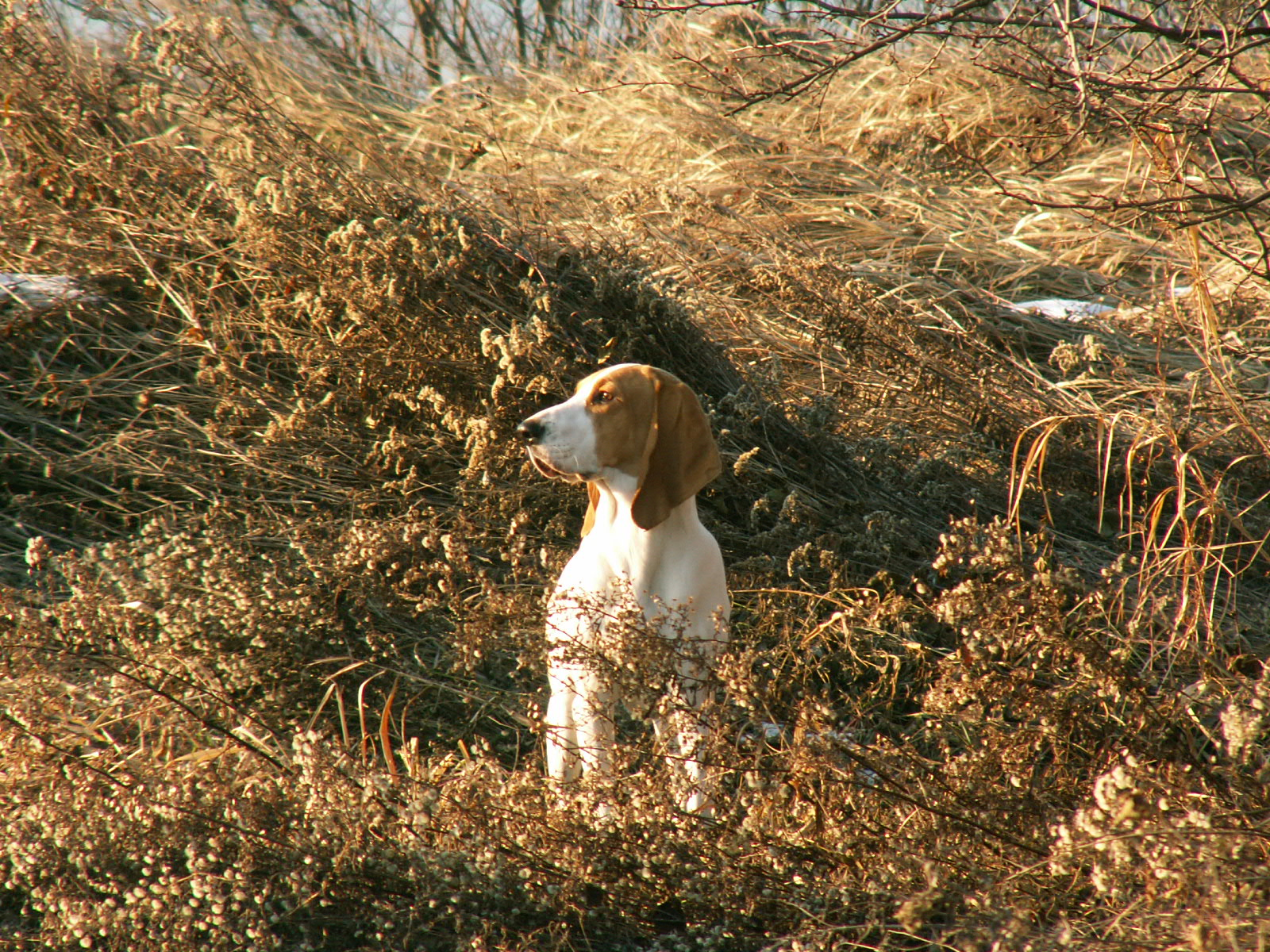 Schweizer Laufhund/Swiss Hound Variety: Schwyzer Laufhund/Schwyz Hound - Dryas Olaska (his website in english).